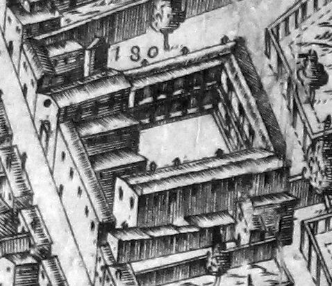 Pianta del buonsignori, dettaglio 180 san salvestro monastero (San Silvestro)